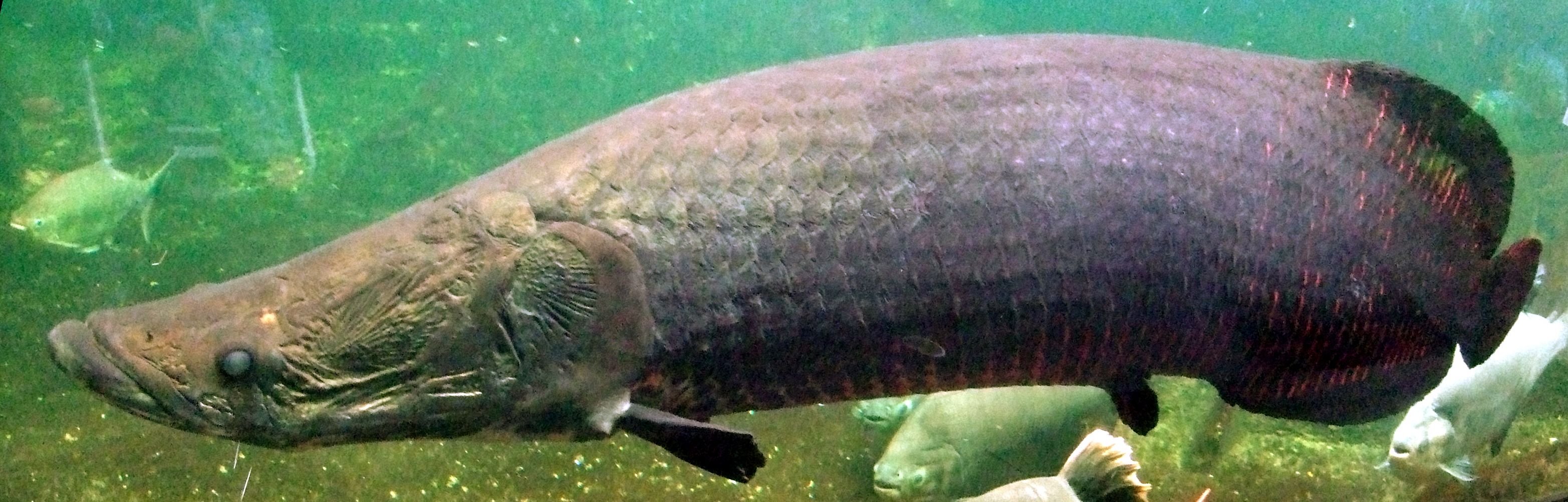 Arapaima gigas im Zoo Berlin